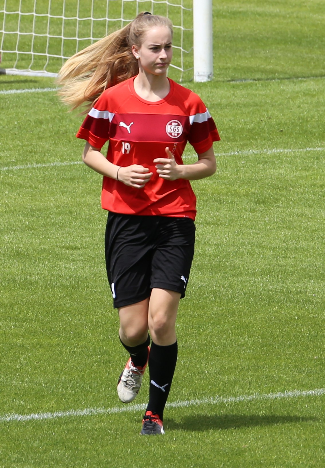 Laura Radke (SGS Essen) beim Aufwärmen vor dem Frauen-Bundesliga-Spiel FC Bayern München gegen SGS Essen am 21. Mai 2017 im Stadion an der Grünwalder Straße (Ergebnis war 2:0)